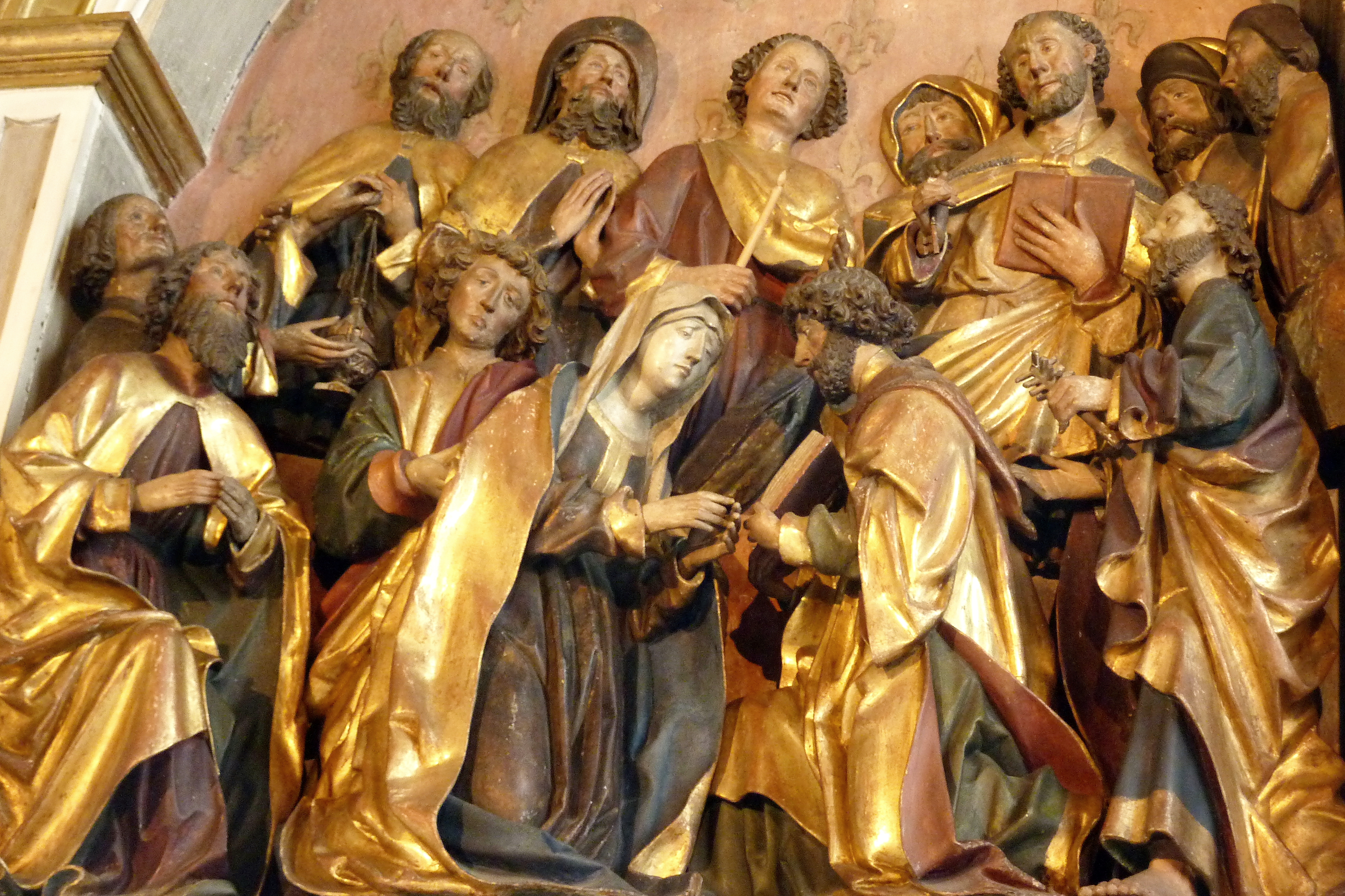 Katholische Pfarrkirche Mariä Himmelfahrt in Täfertingen, einem Stadtteil von Neusäß in Landkreis Augsburg (Bayern), Schnitzaltar, der Schule von Veit Stoss zugeschrieben; Darstellung: Tod Mariens. Maria wird knieend dargestellt, umgeben von den Aposteln, in einem Buch lesend, das der Apostel Jakobus hält.